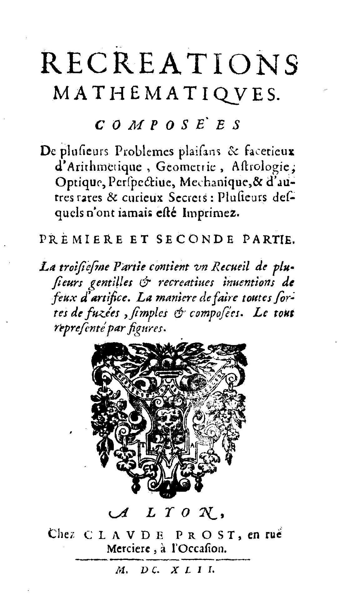 Frontespizio